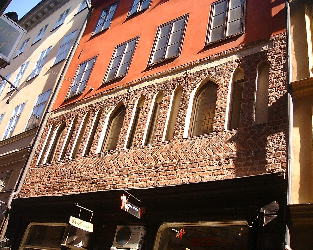 Façade of 29, Västerlånggatan, Gamla stan, Stockholm.